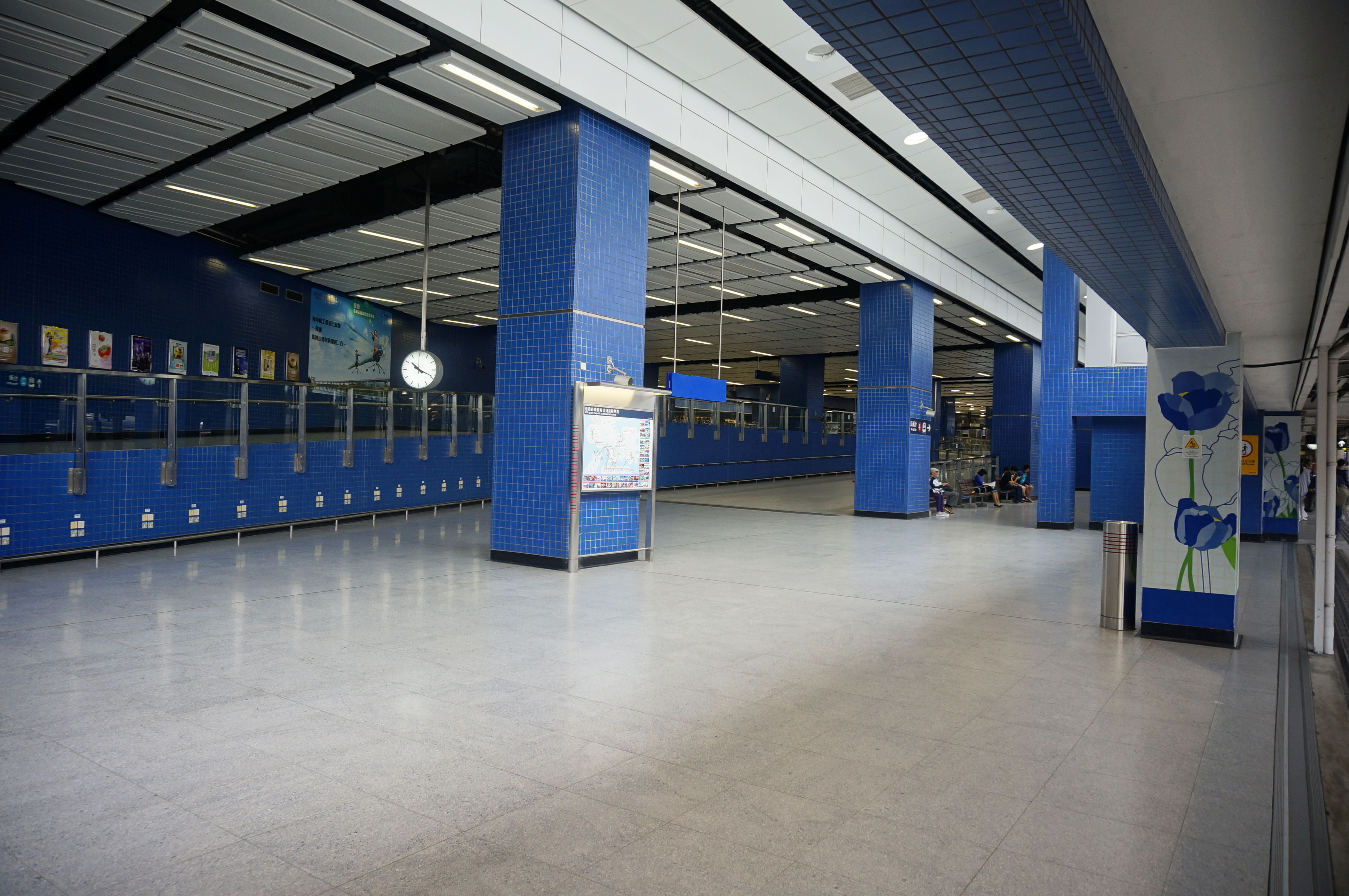 港鐵大圍站轉線通道